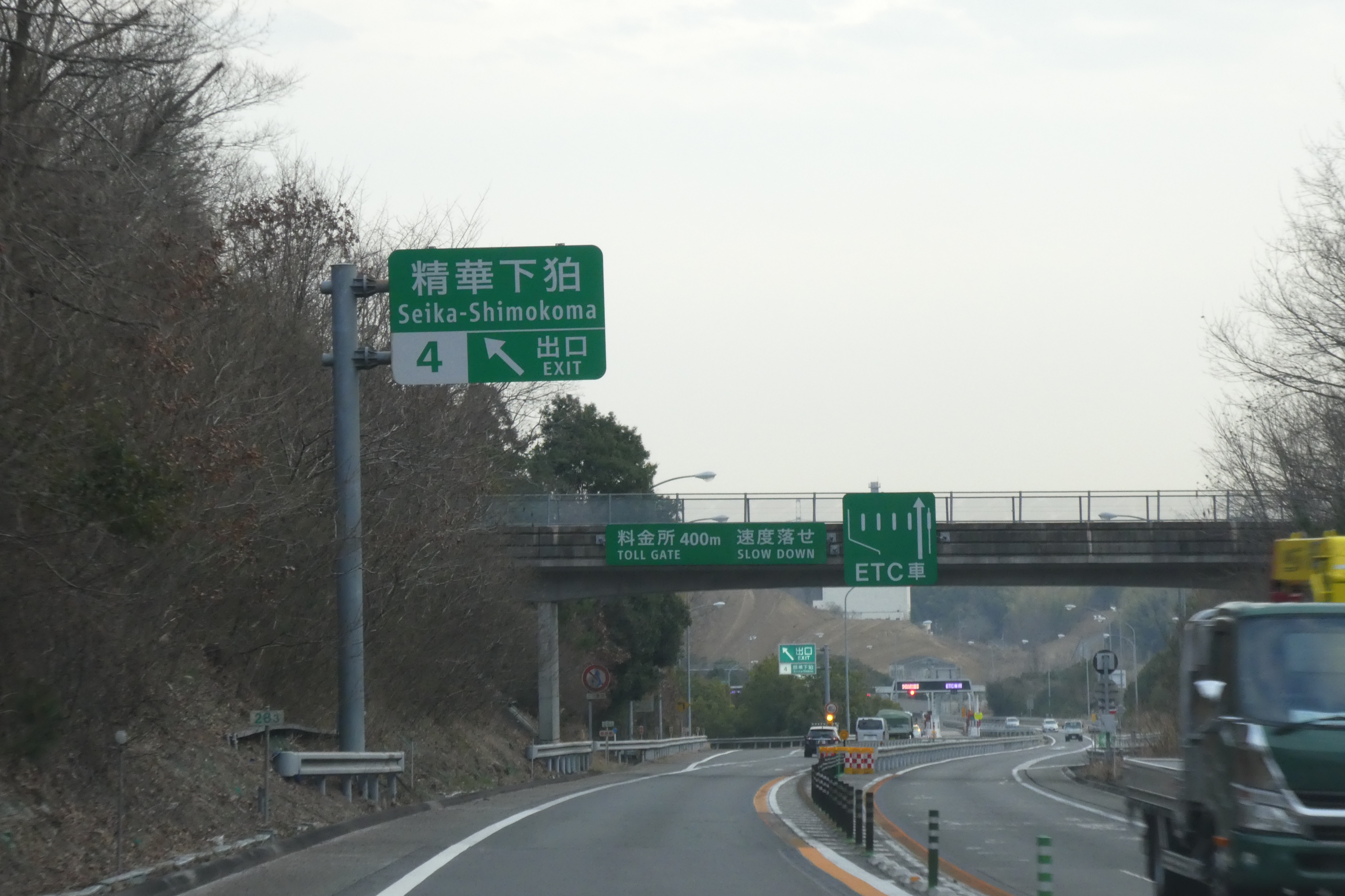 精華下狛インターチェンジ